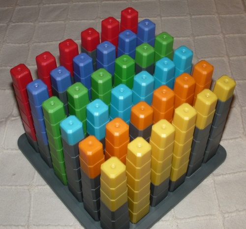 Sicht auf das Puzzle 36 Cube (ungelöster Zustand)